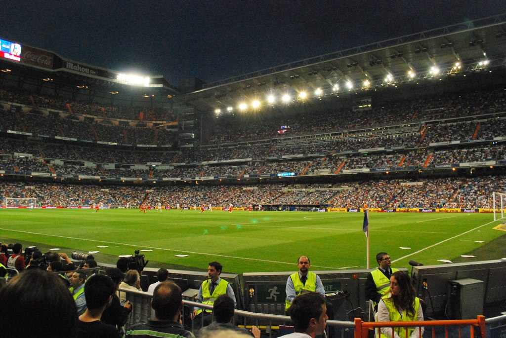 Le Stade Santiago Bernabéu lors d'un match entre le Real Madrid et l'UD Almería.